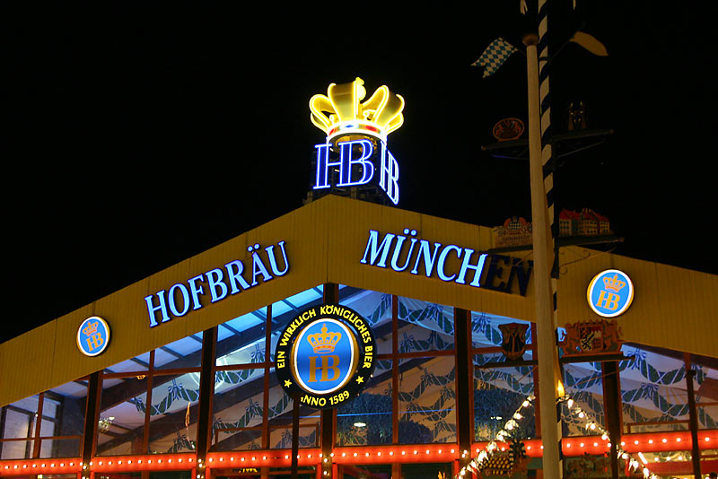 Hofbräu Festzelt (tent of the Hofbräu brewerie)